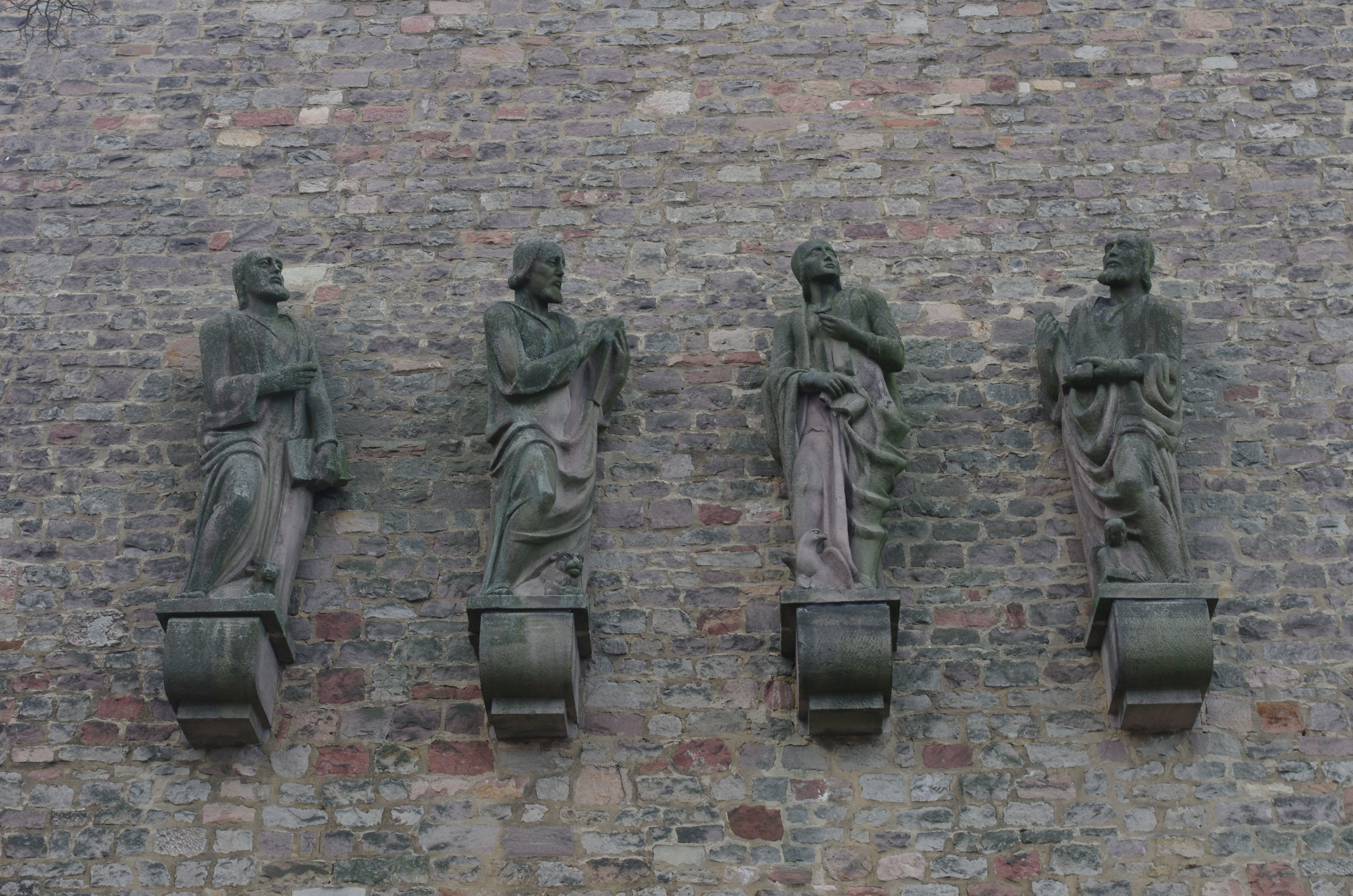 Bebra in Hessen. Die denkmalgeschützte Auferstehungskirche. An der Außenmauer befinden sich vier Skulpturen der Evangelisten. Sie wurden zwischen 1953 und 1957 von Richard Knecht erstellt.